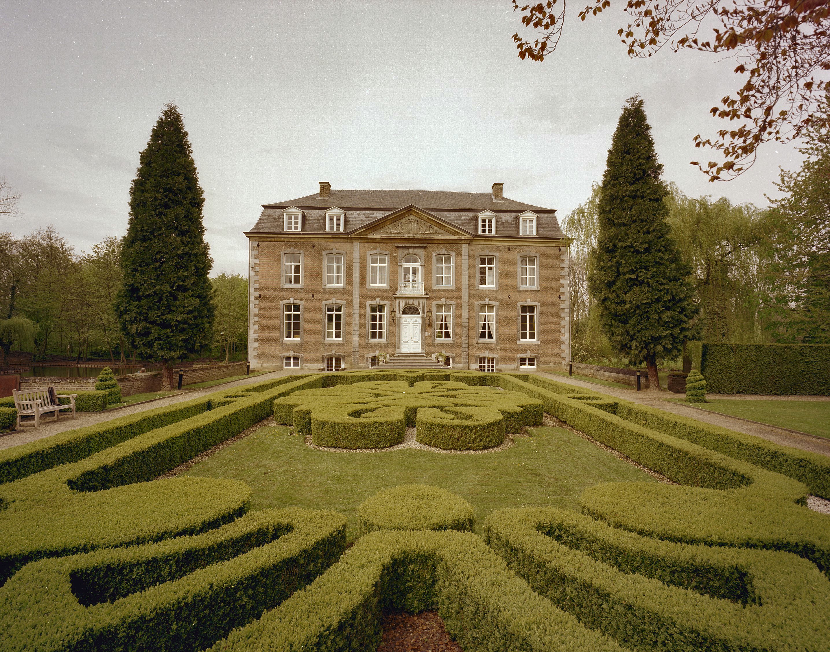 Kasteel Cortenbach: Overzicht van de voorgevel met fronton, aangelegde tuin op de voorgrond (opmerking: Gefotografeerd voor Kastelen in Limburg (1000-1800), Burchten en landhuizen)